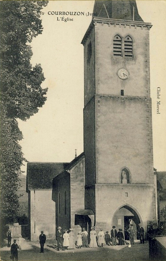 Église de Courbouzon vers 1905.